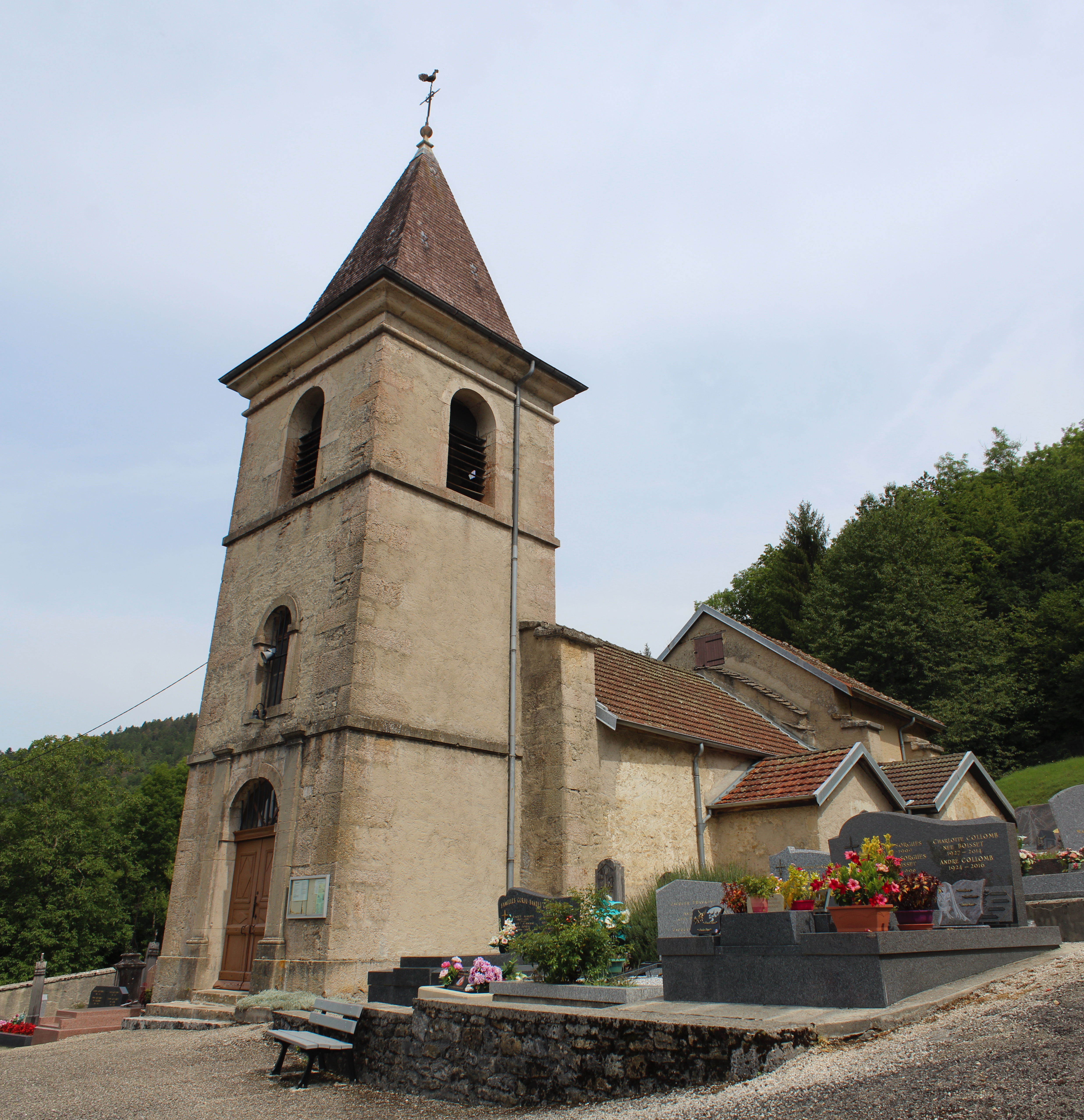 Église Saint-Jean-Baptiste de Géovreissiat.